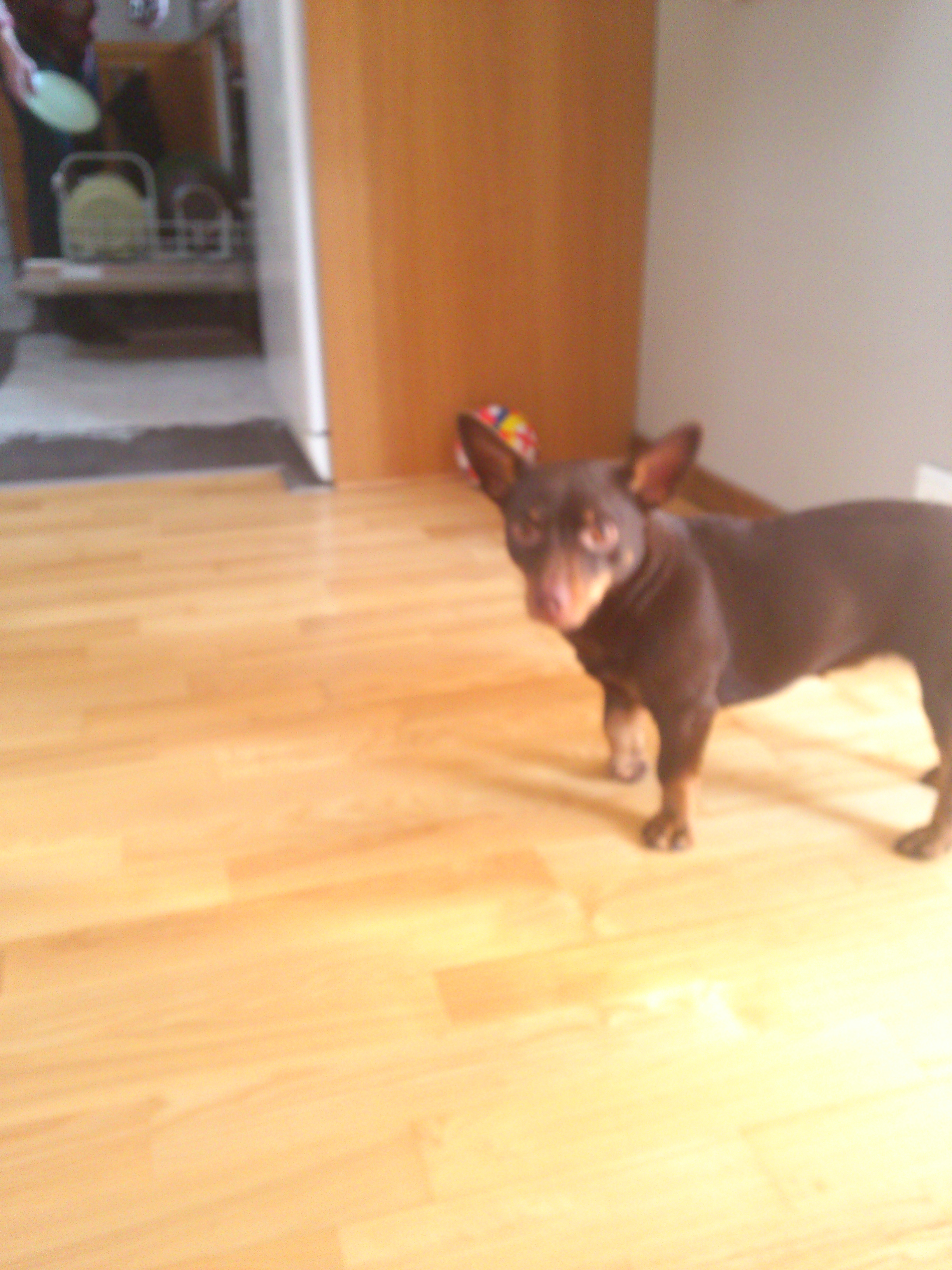 En brun Lancashire Heeler